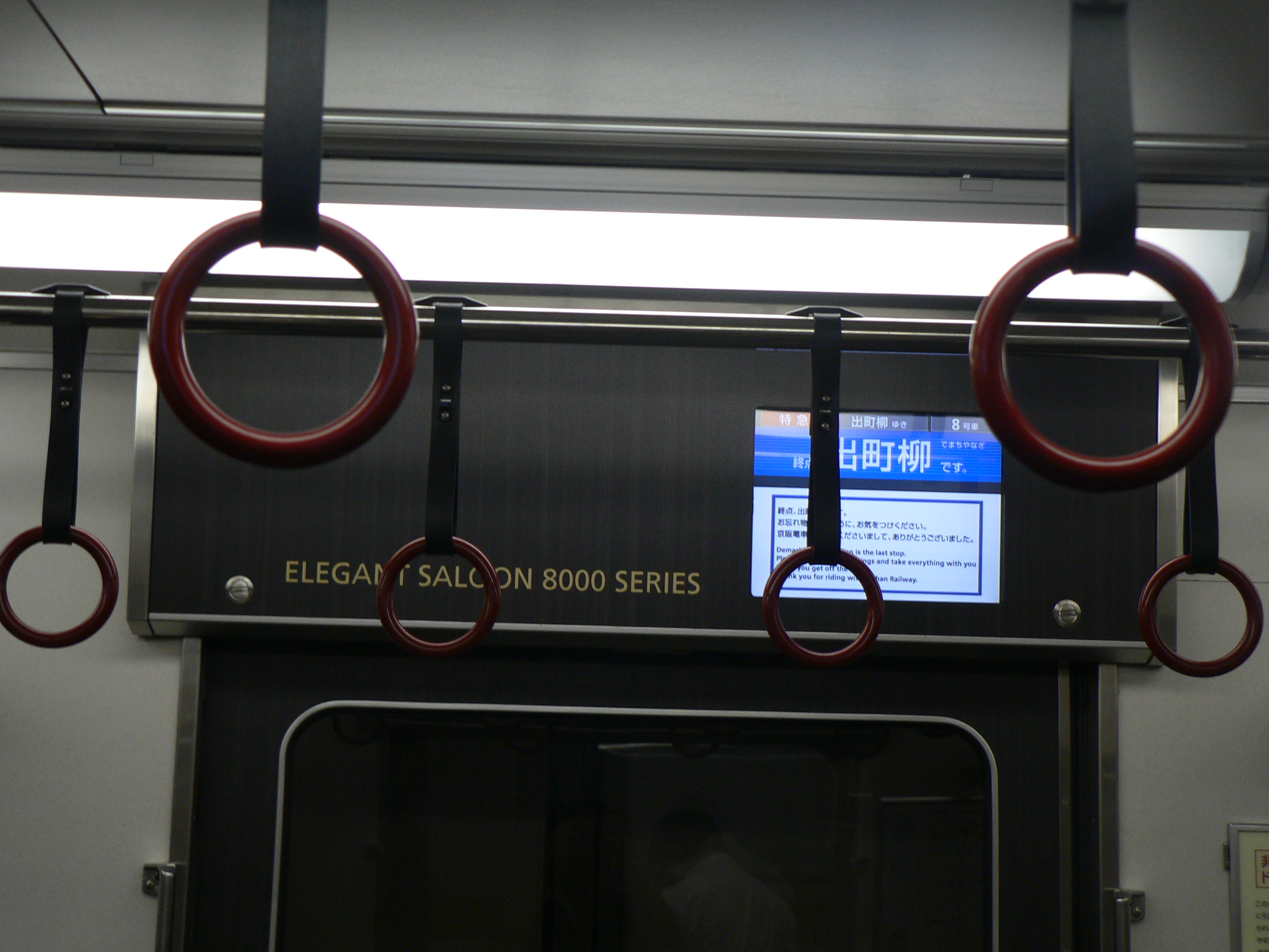 京阪8000系リニューアル車のドア部液晶モニタ。